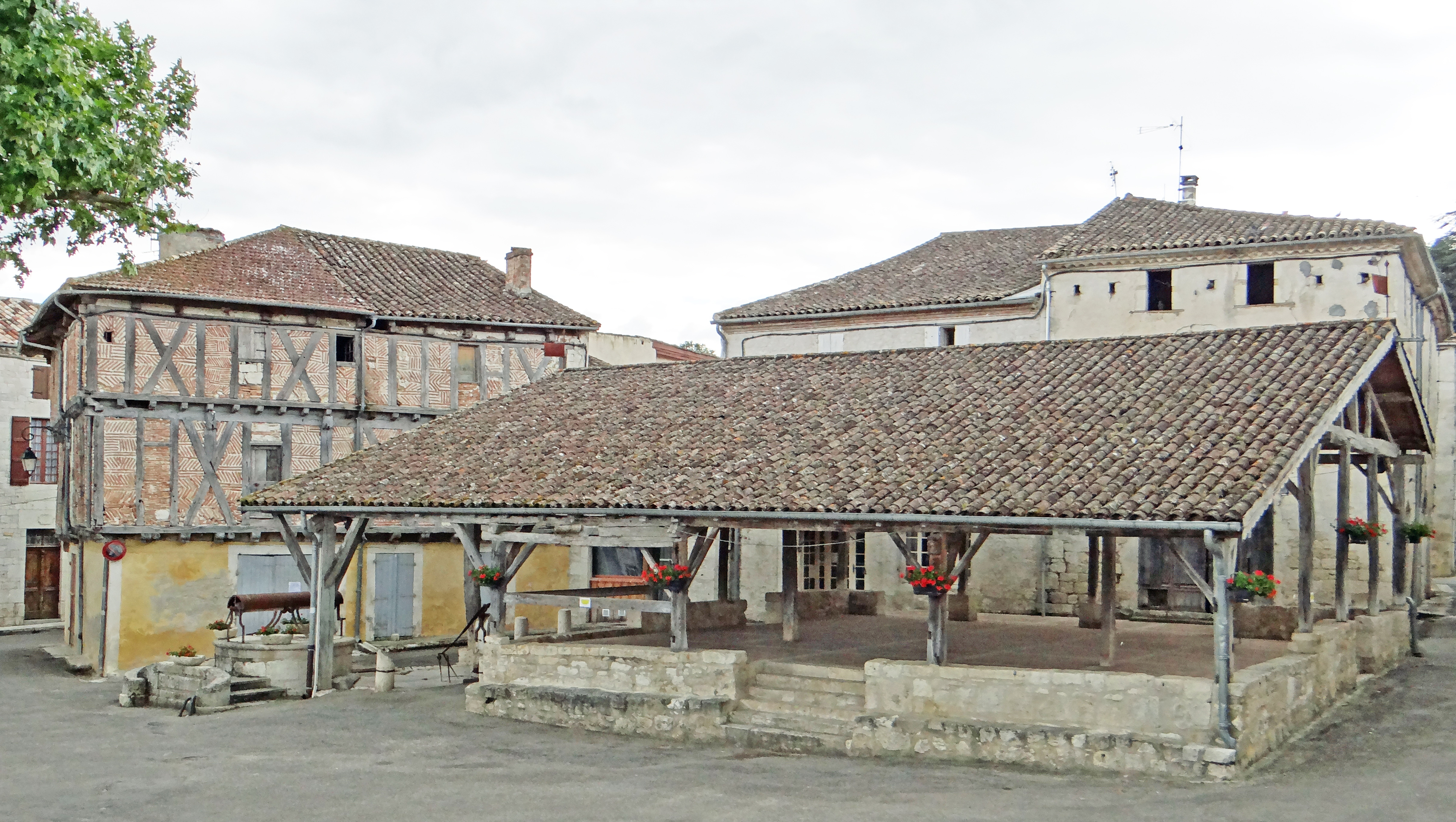 Saint-Maurin - Ensemble devant la mairie